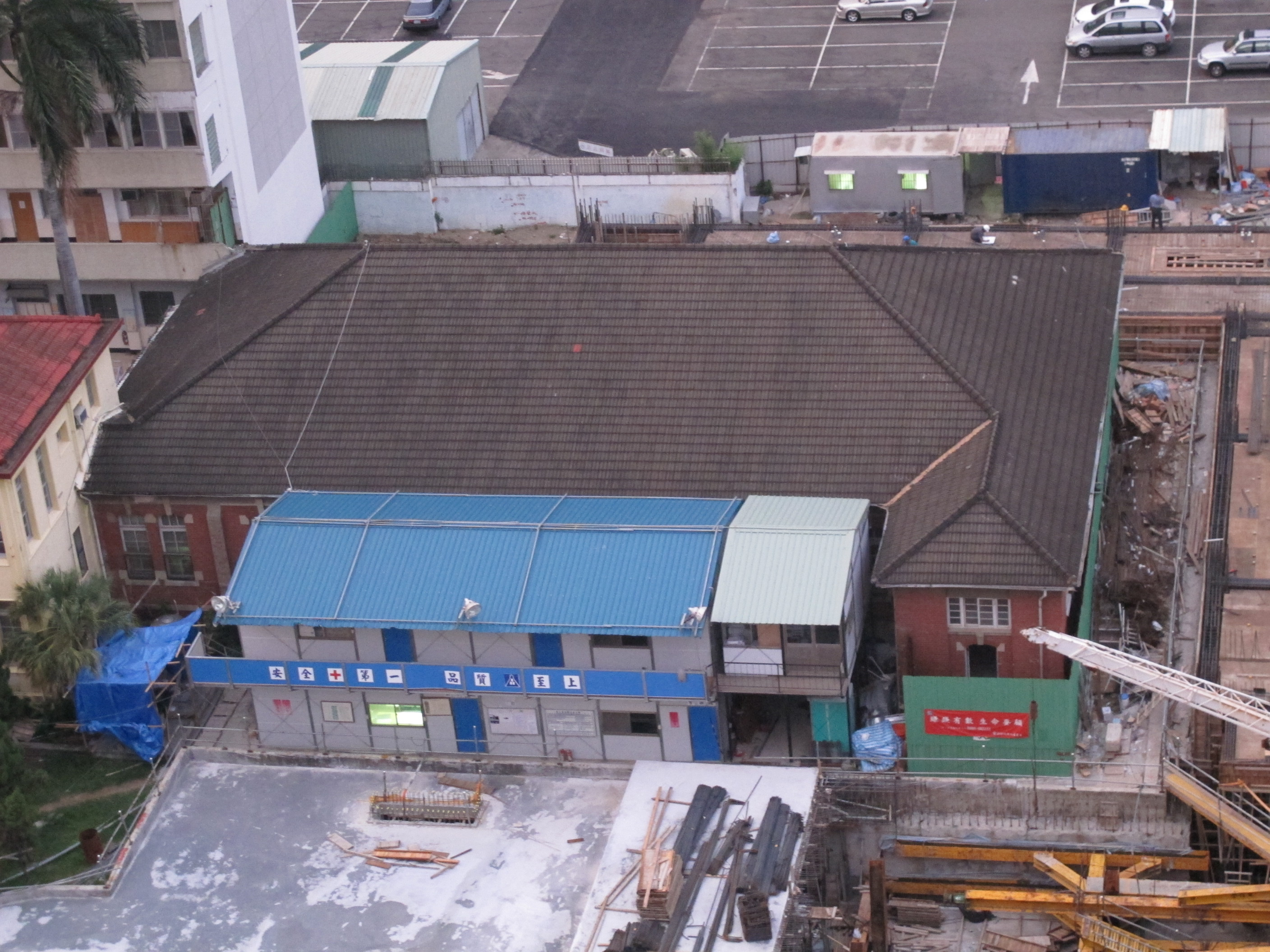 原臺南州立臺南病院現僅存建築